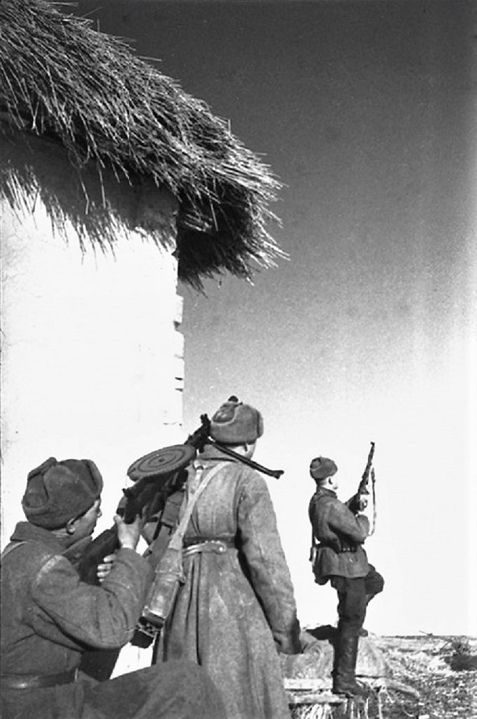 Юго-Западный фронт. Пулемётчик 20-го гвардейского кавалерийского полка красноармеец Георгий Дмитриевич Зломанов ведёт огонь по самолёту из ручного пулемёта ДП